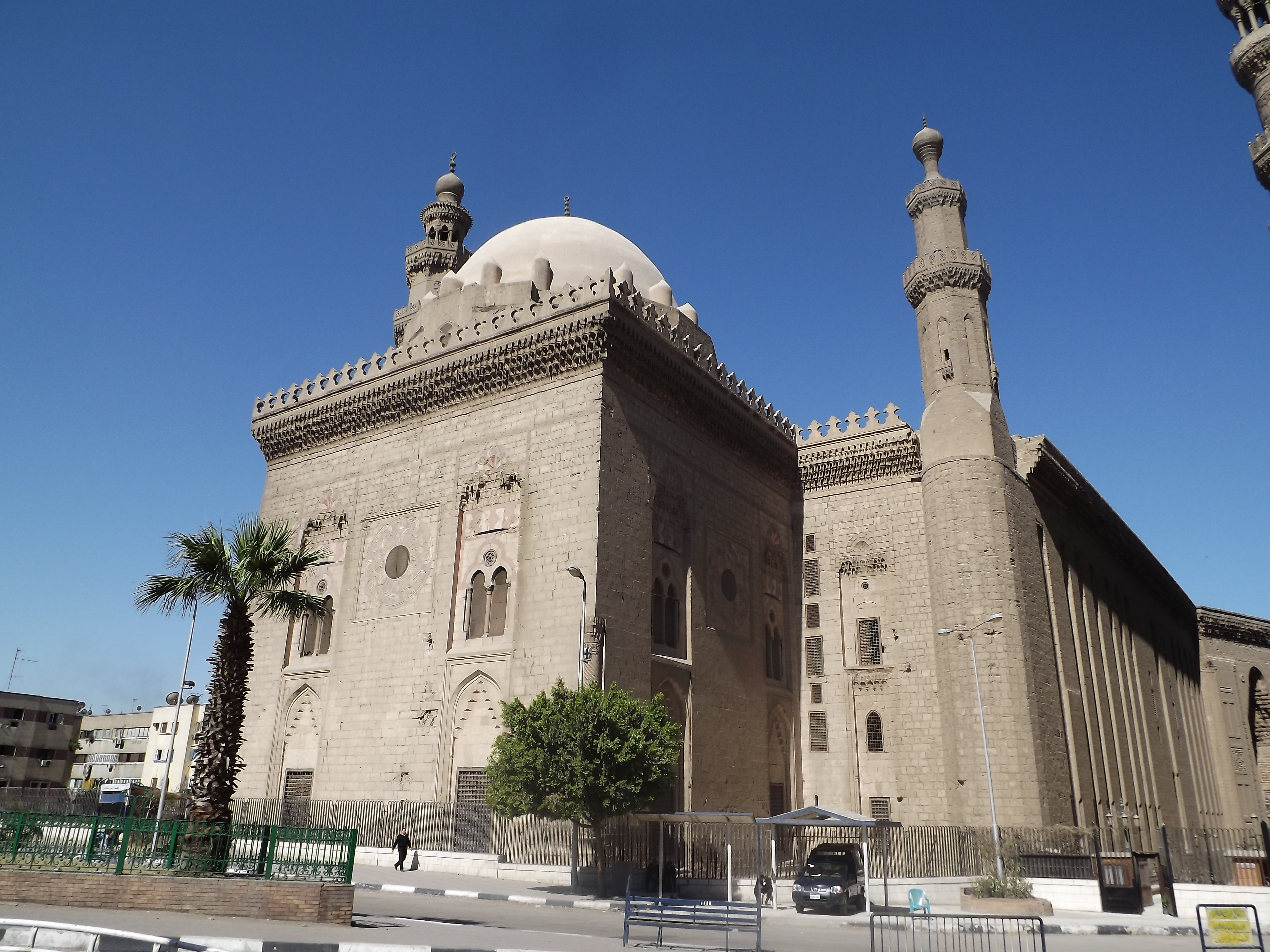 من العصر المملوكي